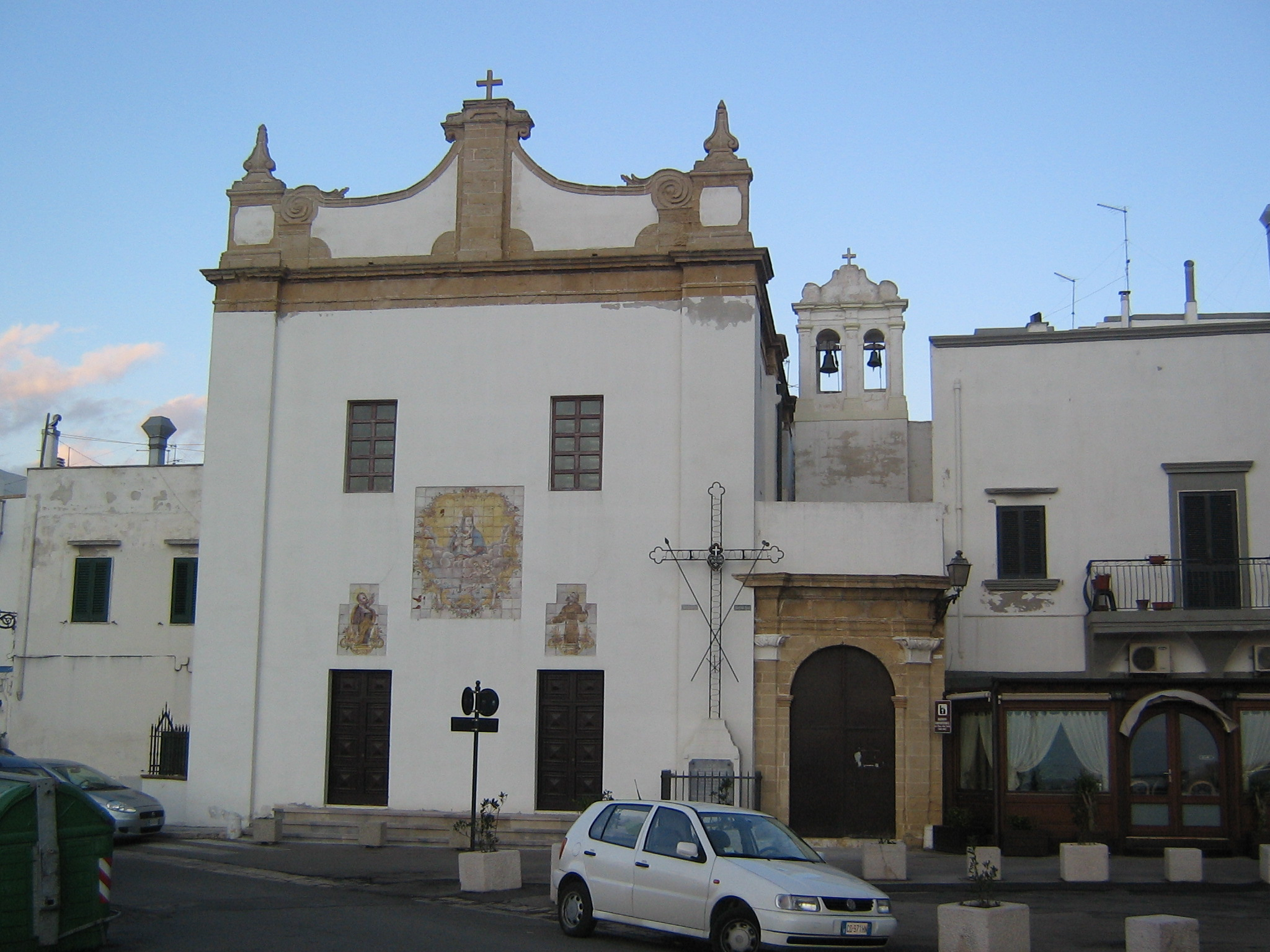 Chiesa Gallipoli